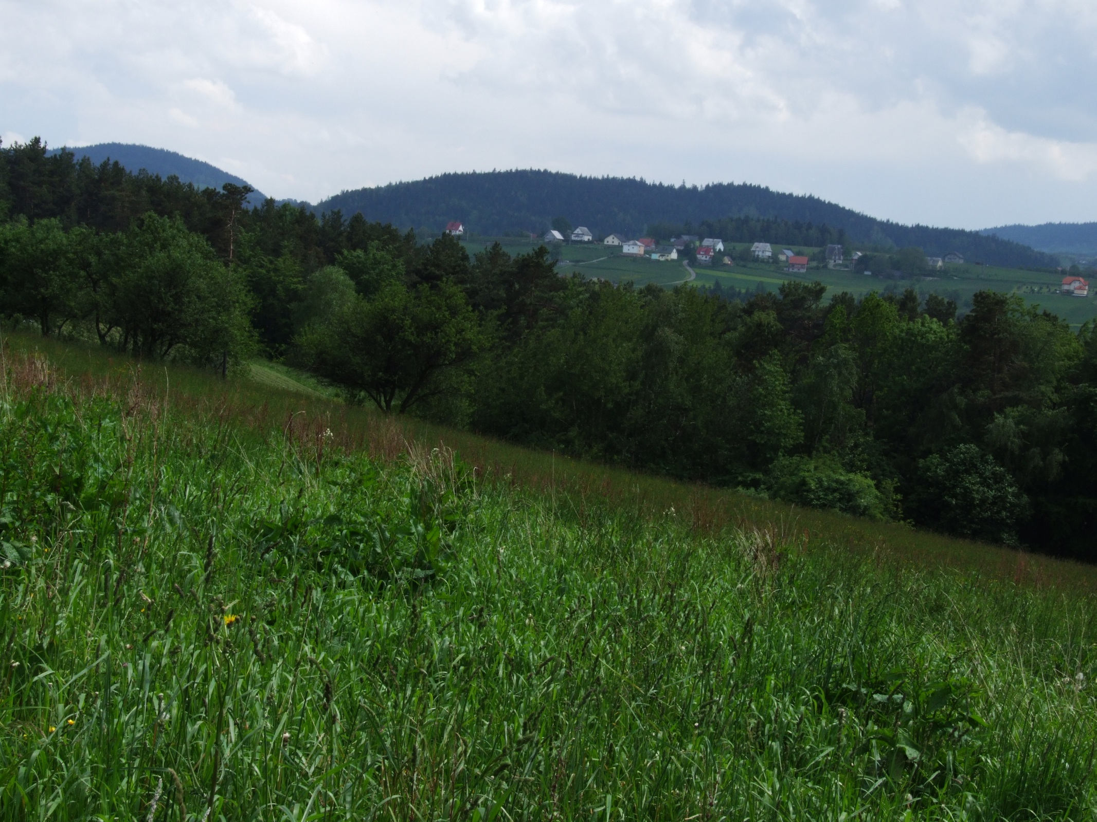 Widok z Jabłońca koło Limanowej na Łyżkę (w głębi po lewej stronie) i Kuklacz (na środku)